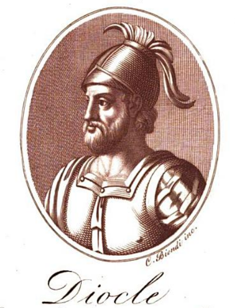 Ritratto di Diocle